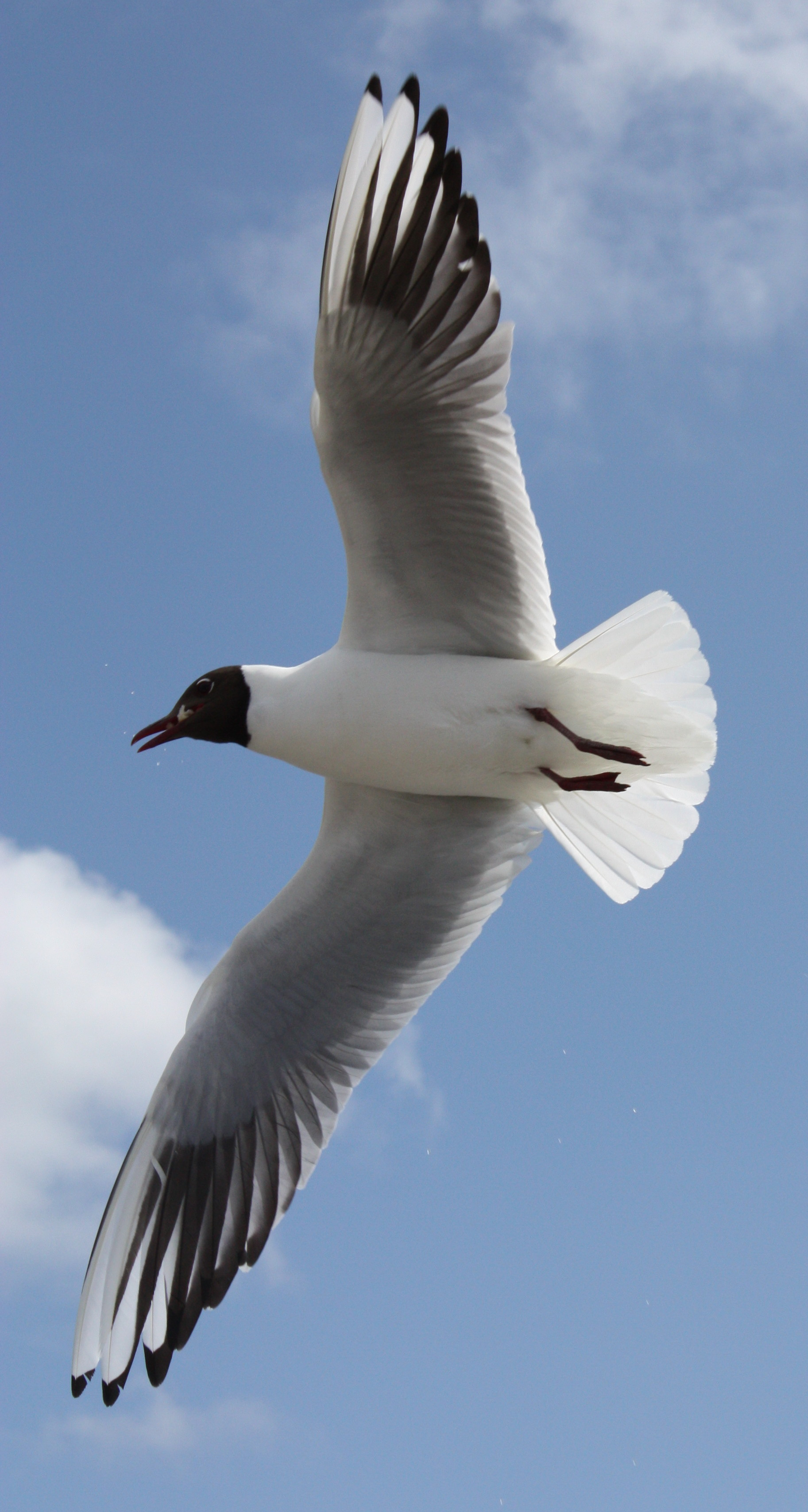 Gulls in flight, Möwen im Flug, Cuxhaven